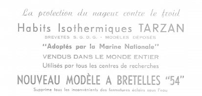 Création du vêtement isothermique tarzan